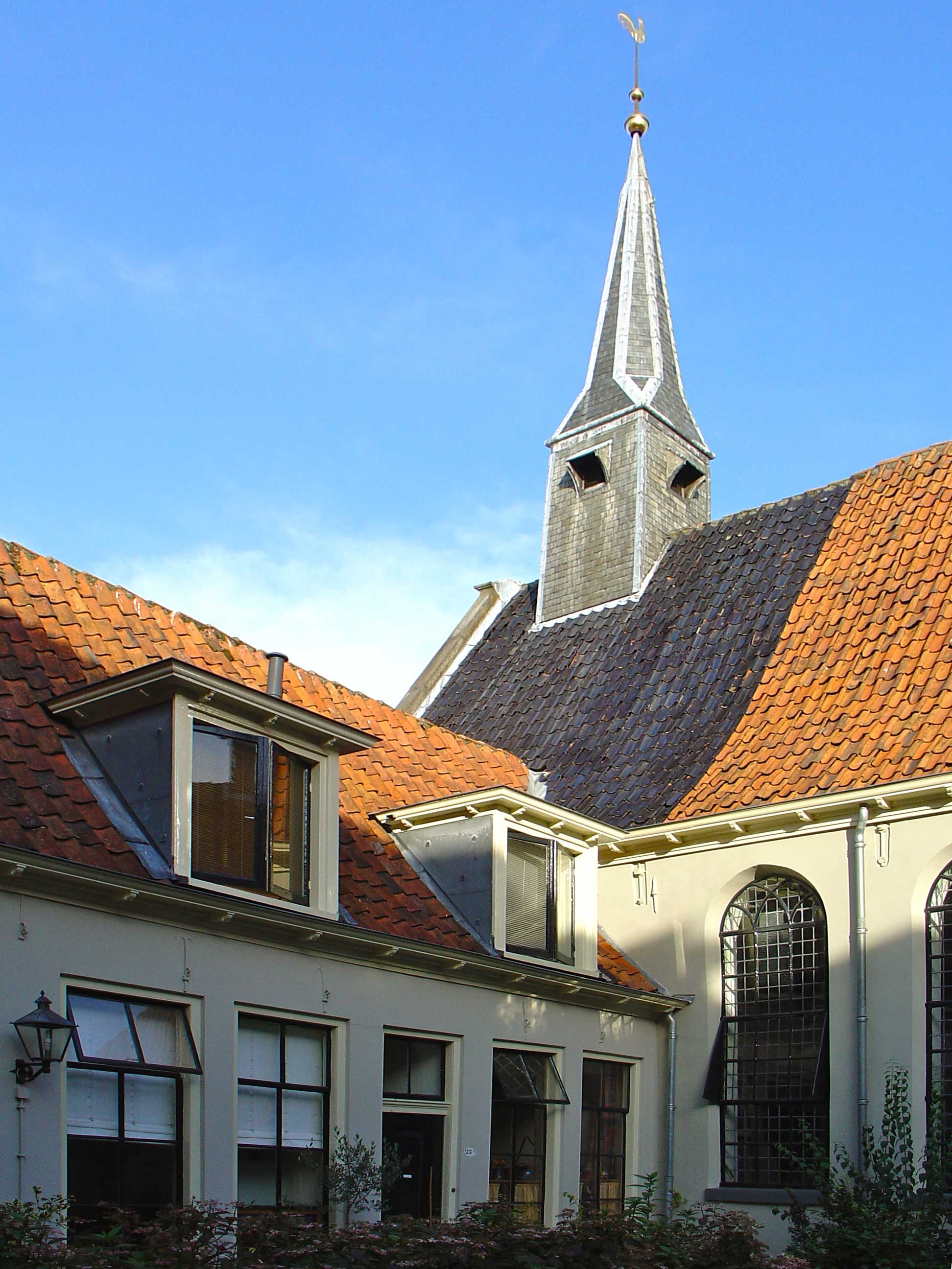 Het Peper- of Geertruitsgasthuis te Groningen